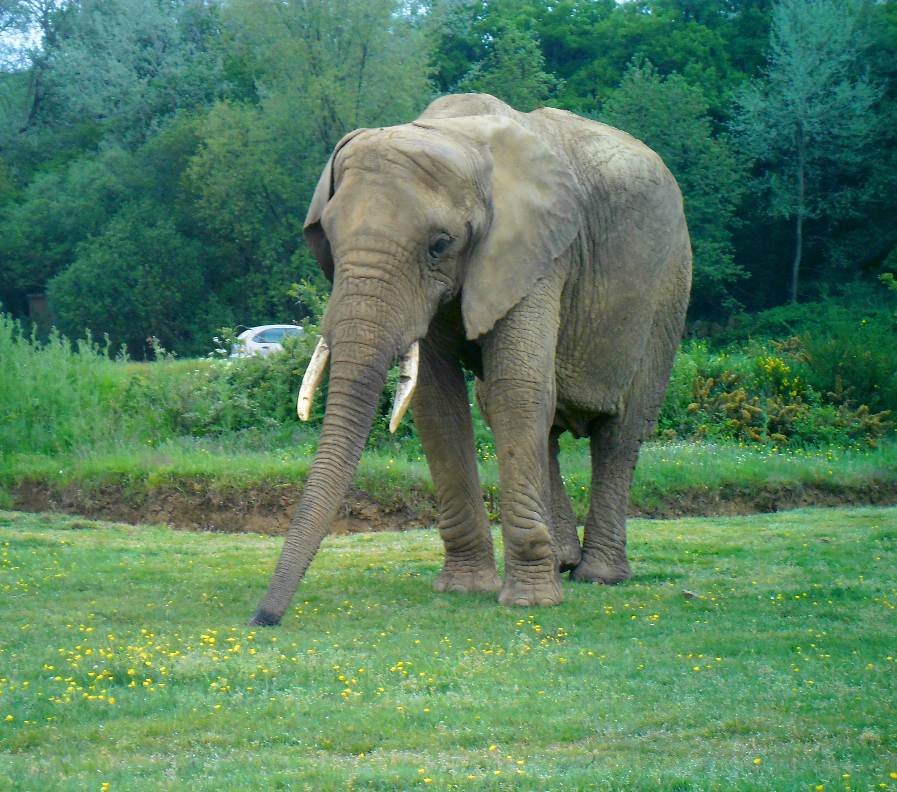 Planète sauvage 2013